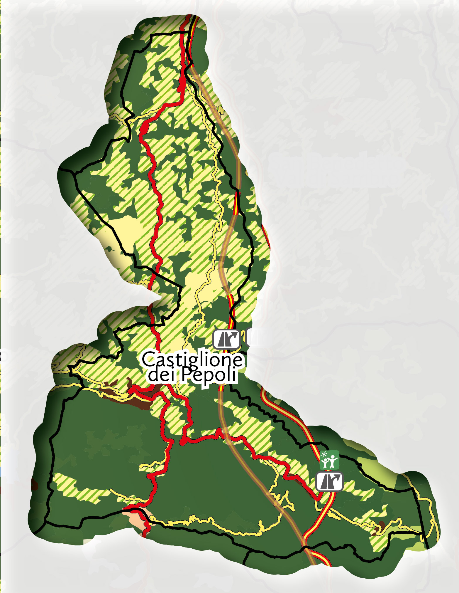 Occupazione del suolo (Fonte: Corina Land Cover)